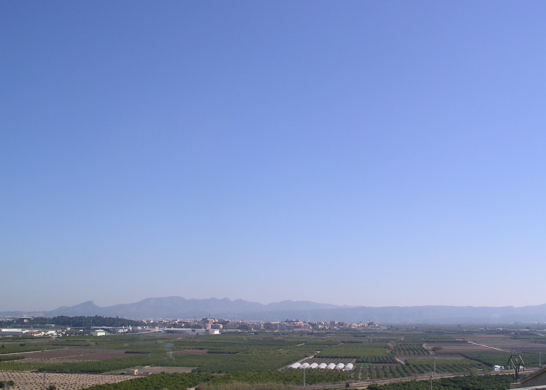 Vista de la localidad de Alberique, desde la montaña, Valencia, España